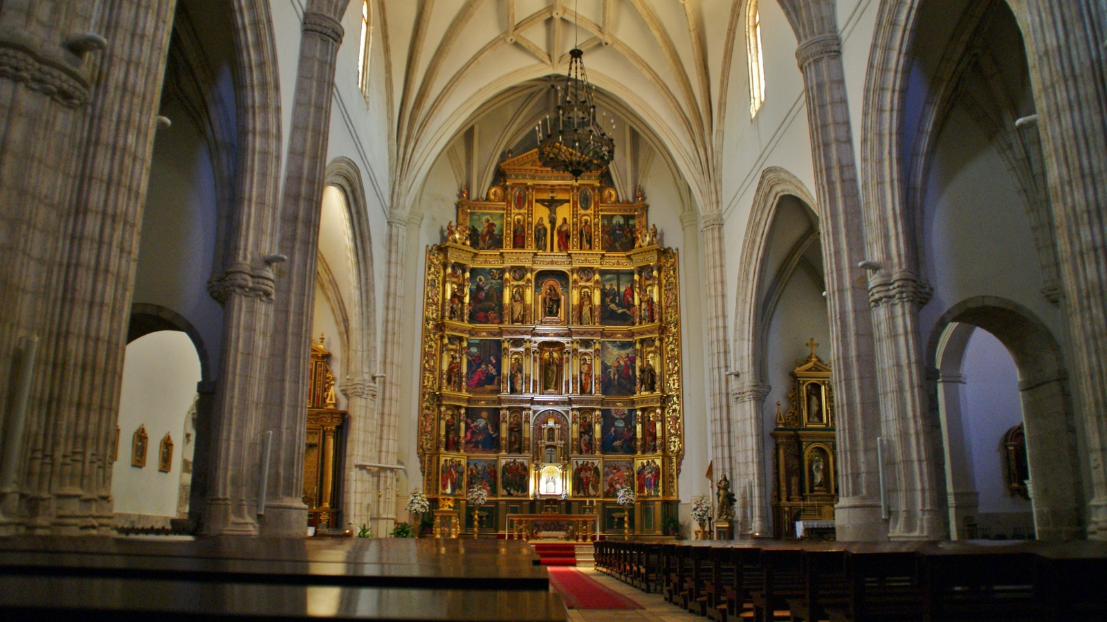 Capilla Mayor de la Iglesia Parroquial de Stª María Magdalena, siglo XV, una de las primeras del renacimiento español, Mondéjar, Guadalajara